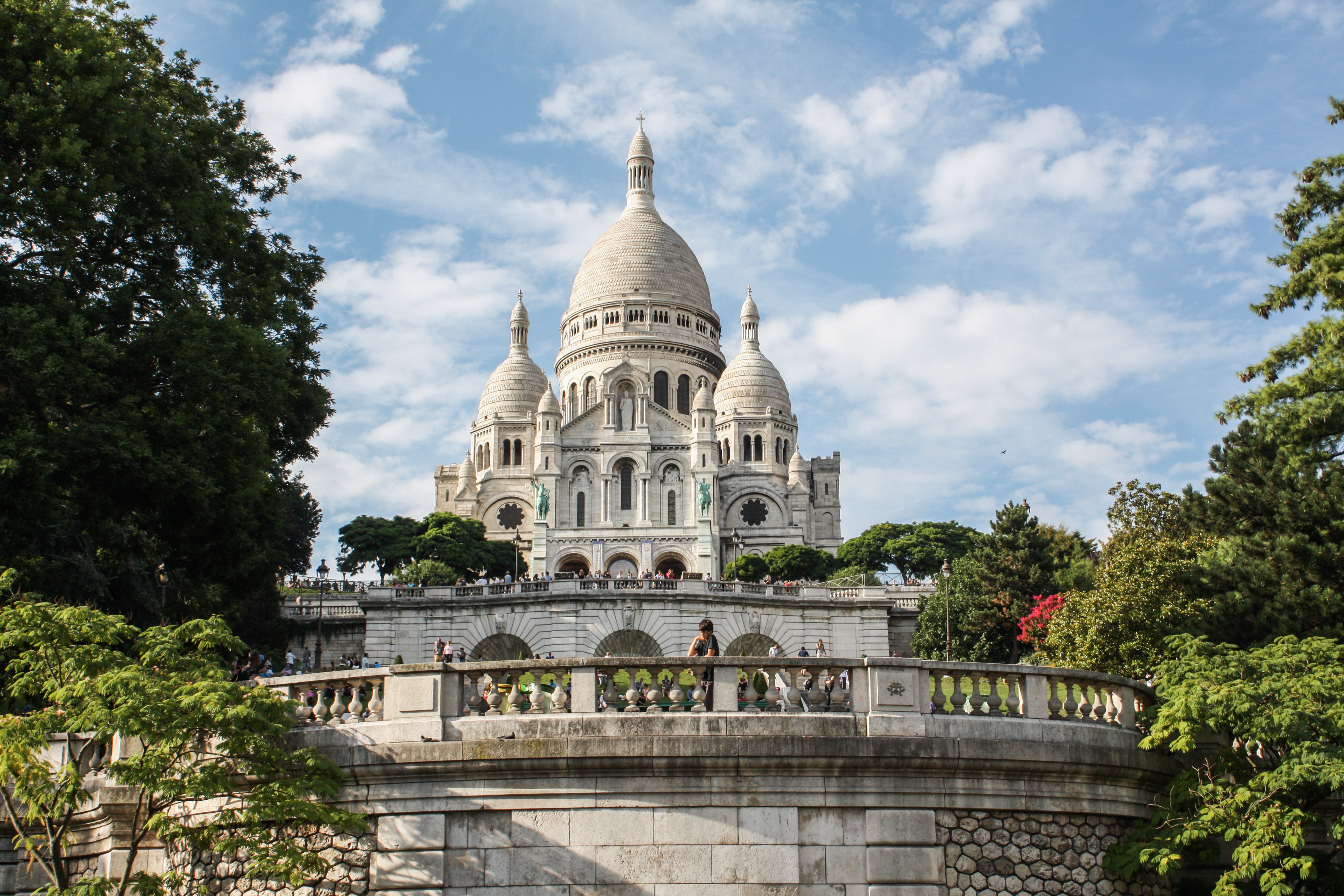 Basilique du Sacré-Cœur, Paris.